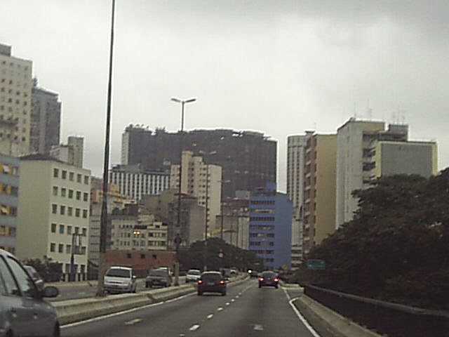 Edifício Copan e Elevado Presidente Costa e Silva.